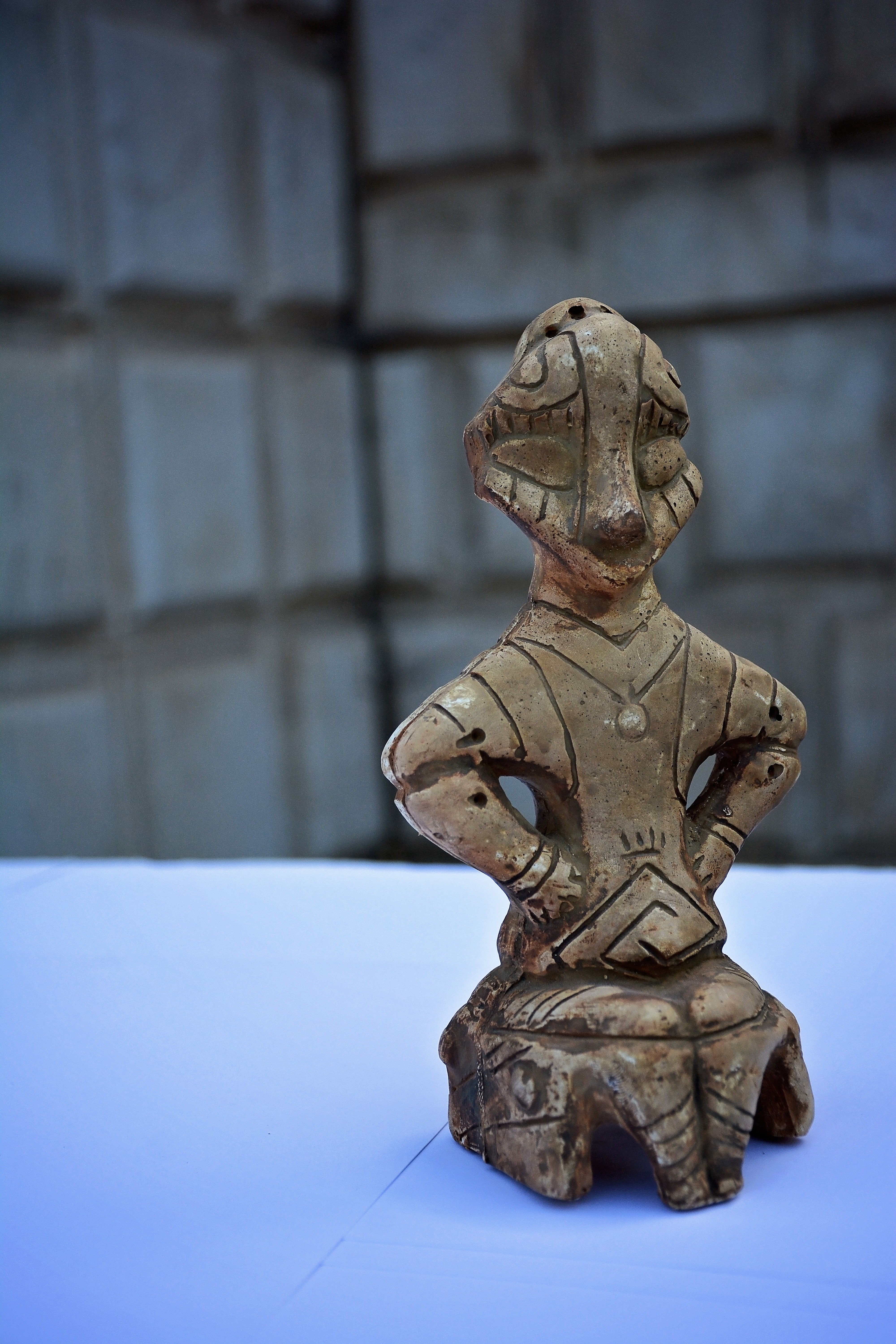 Figurine antropomorfe, “Hyjnesha ne fron”